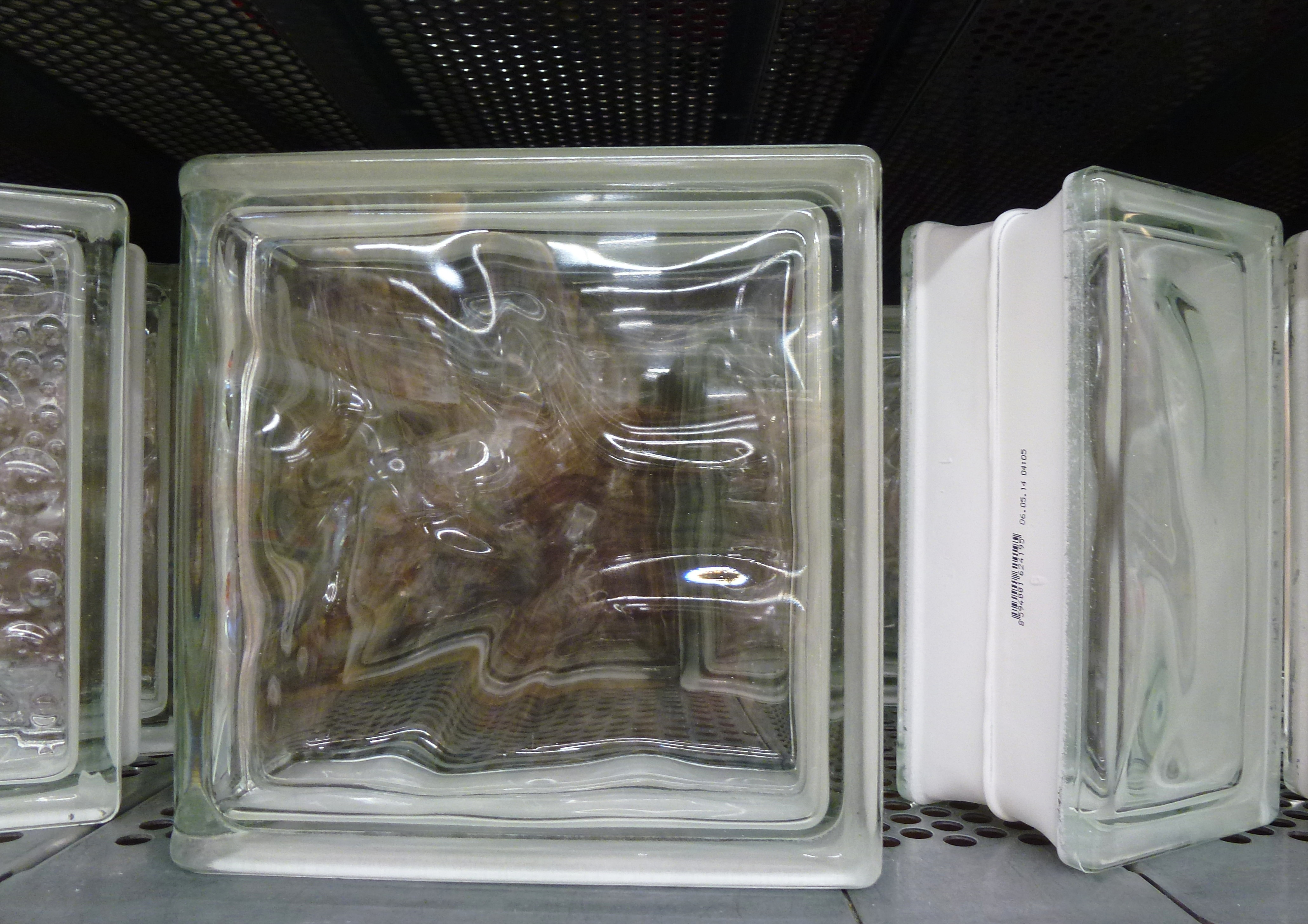 Glasblock på en byggmarknad